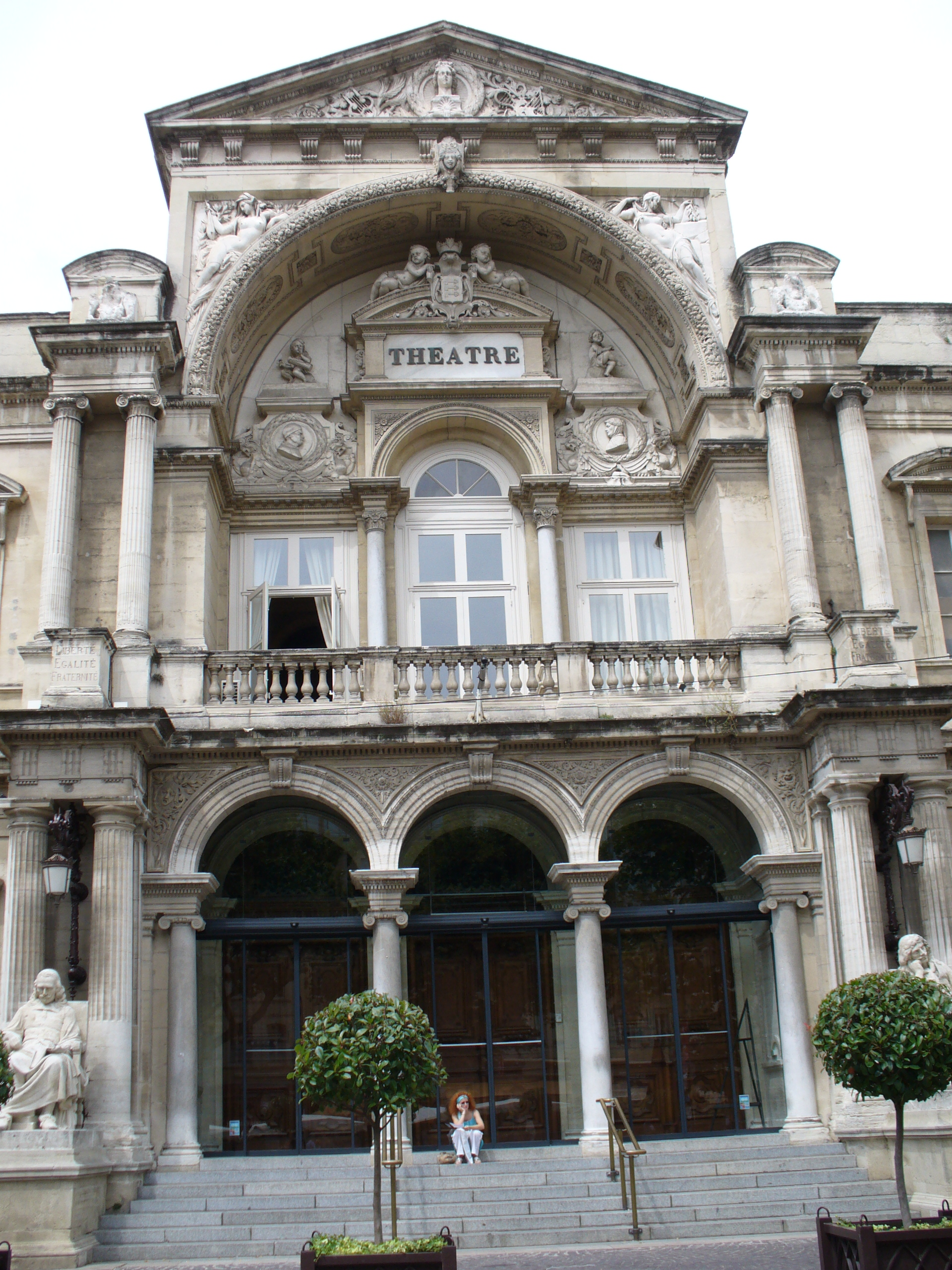 Avignon-Theatre-Opera-1846-1847 anstelle des alten abgebrannten Theaters von den Architekten Leon Feucheres&Theodore Charpentier errichtet 1.